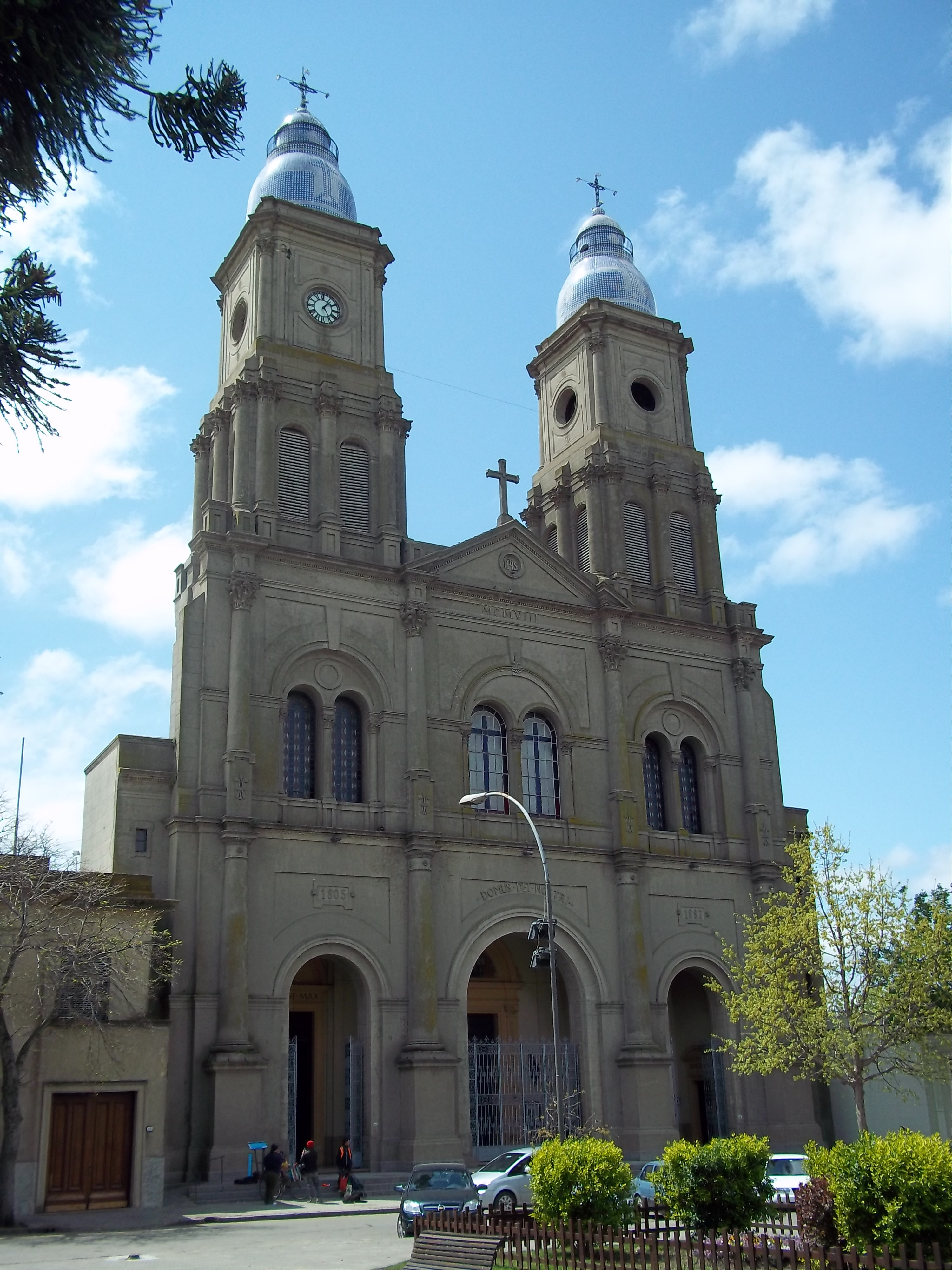 Fachada de la catedral de Florida, ciudad capital del departamento de Florida, Uruguay. Foto tomada desde la plaza "Asamblea 25 de agosto de 1825"